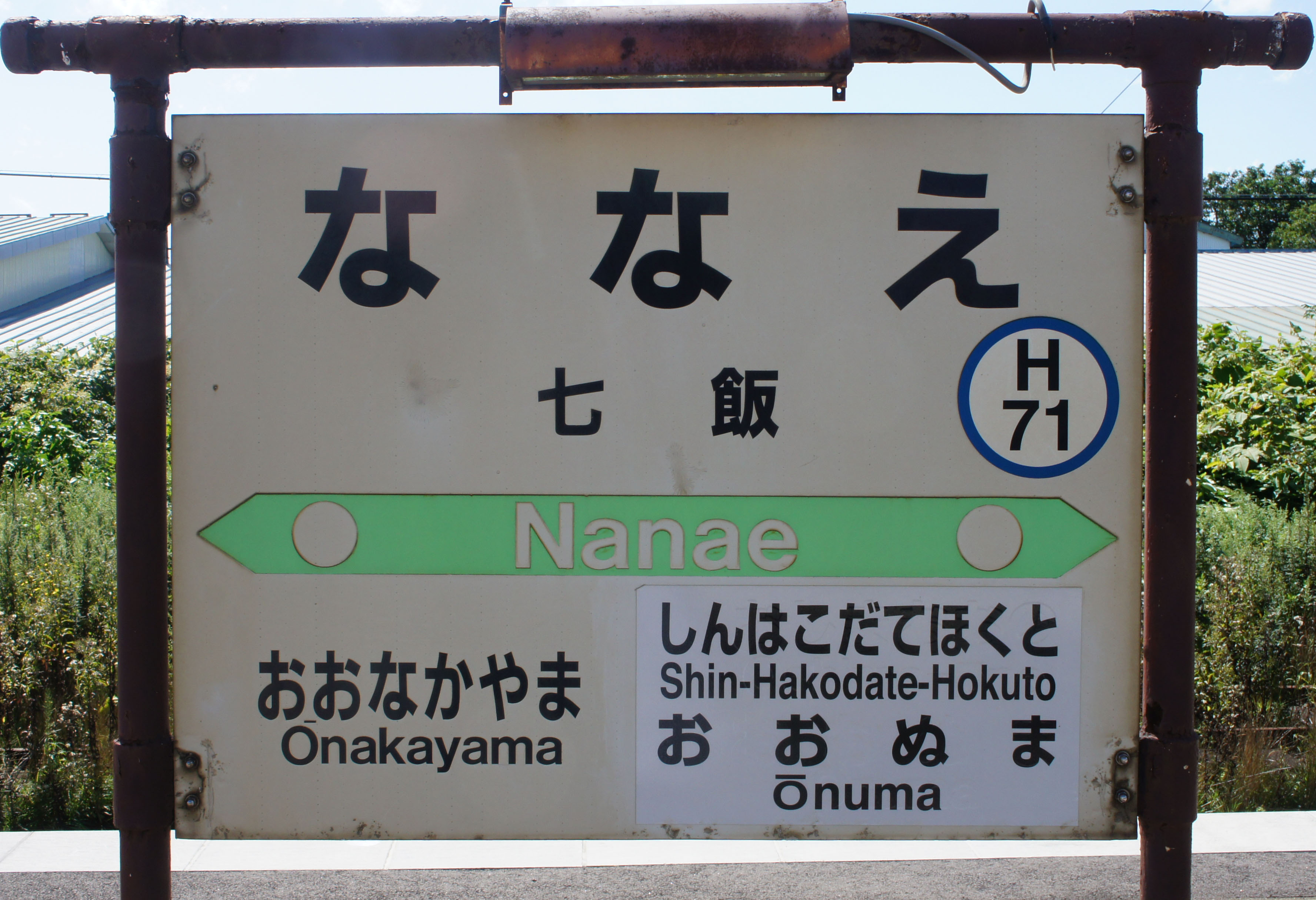 JR函館本線・七飯駅の駅名標 Sony NEX-3